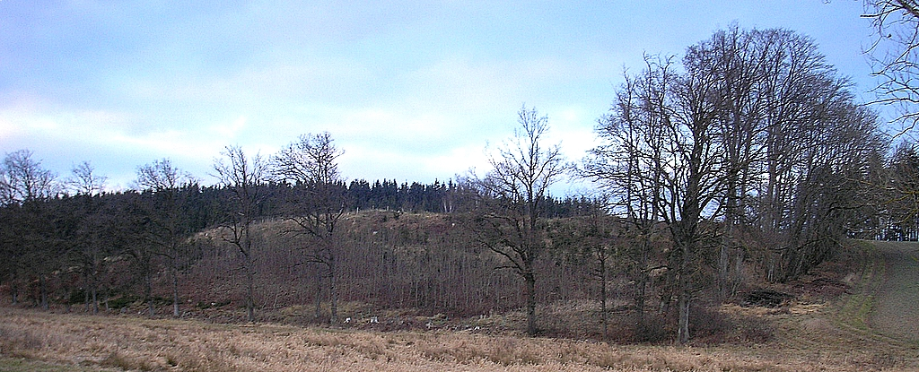 Frühmittelalterlicher Ringwall bei Mittelstetten (Landkreis Fürstenfeldbruck, Oberbayern). Gesamtansicht von Südwesten. Eigene Aufnahme, Dez. 2007 / Early Middle Ages ringwork castle near Mittelstetten (Landkreis Fuerstenfeldbruck, Upper Bavaria, Germany). Total view from south west. Own photo, Dec. 2007